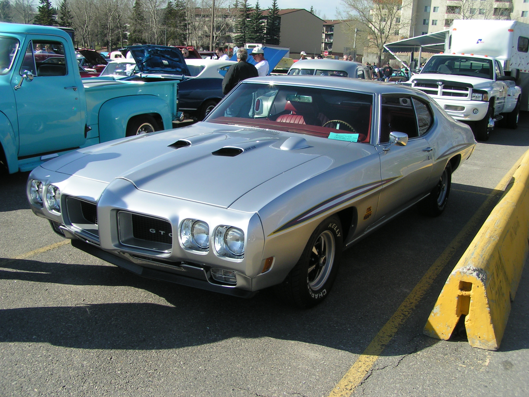 Pontiac GTO